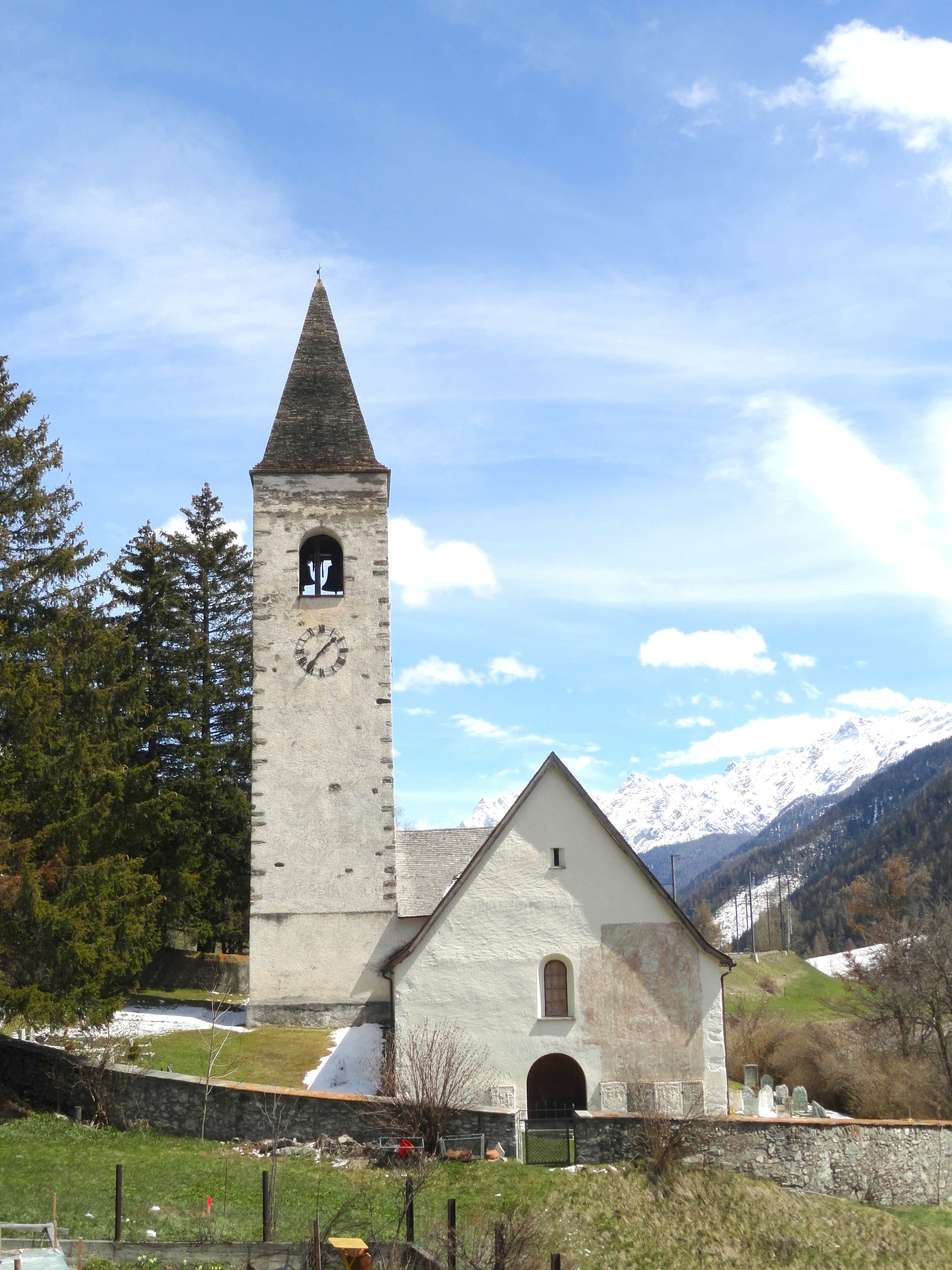 Reformierte Kirche Lavin Ansicht von Weste